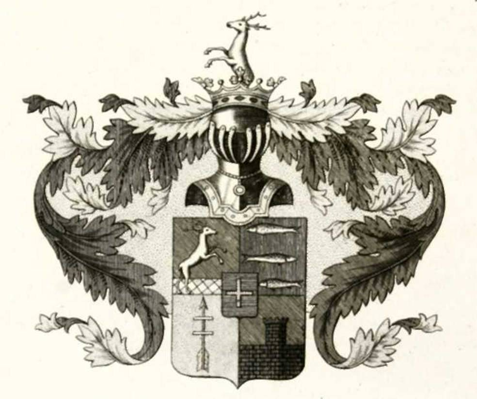 Герб Ланских